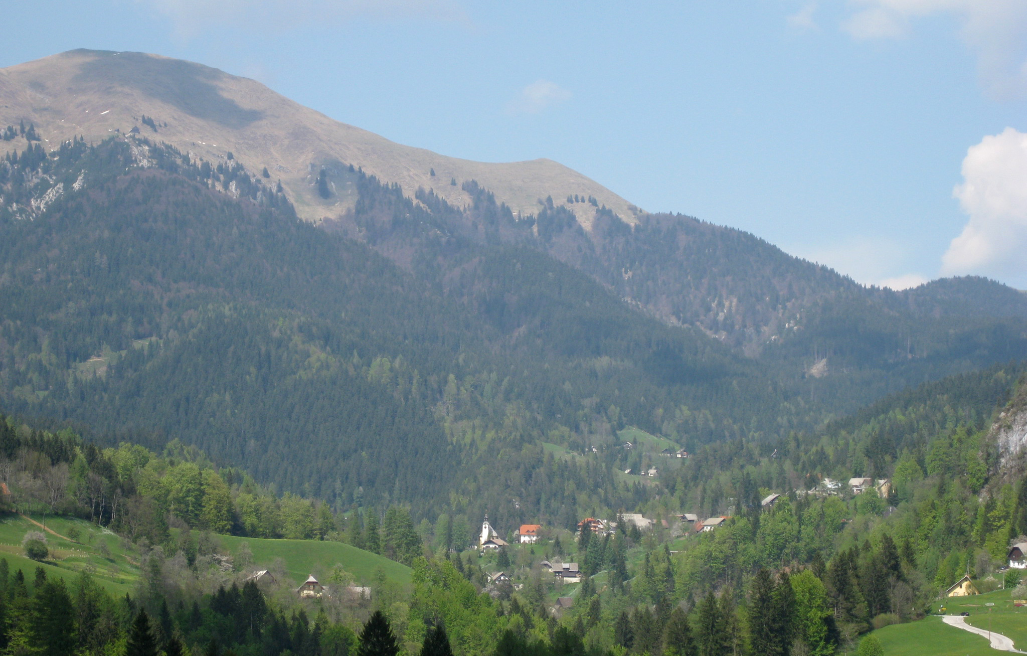 Planina pod Golico, village in Slovenia (near Jesenice)